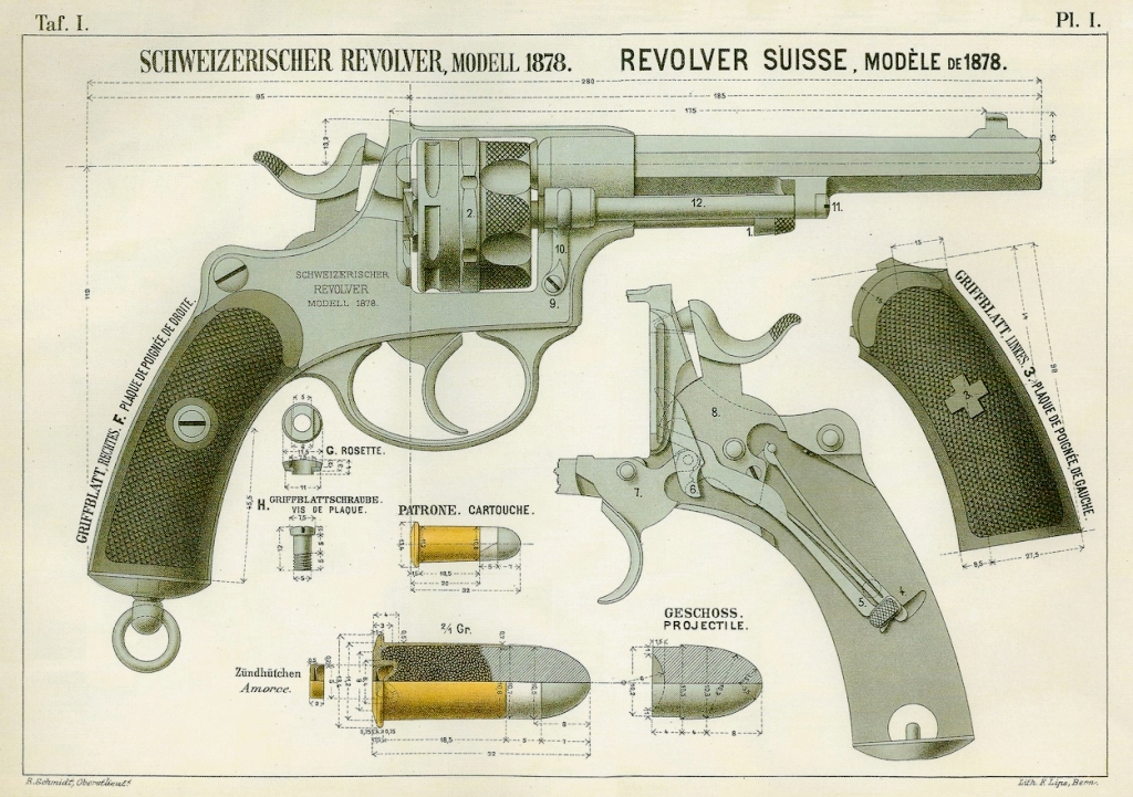 Revolver 1878 Warnant